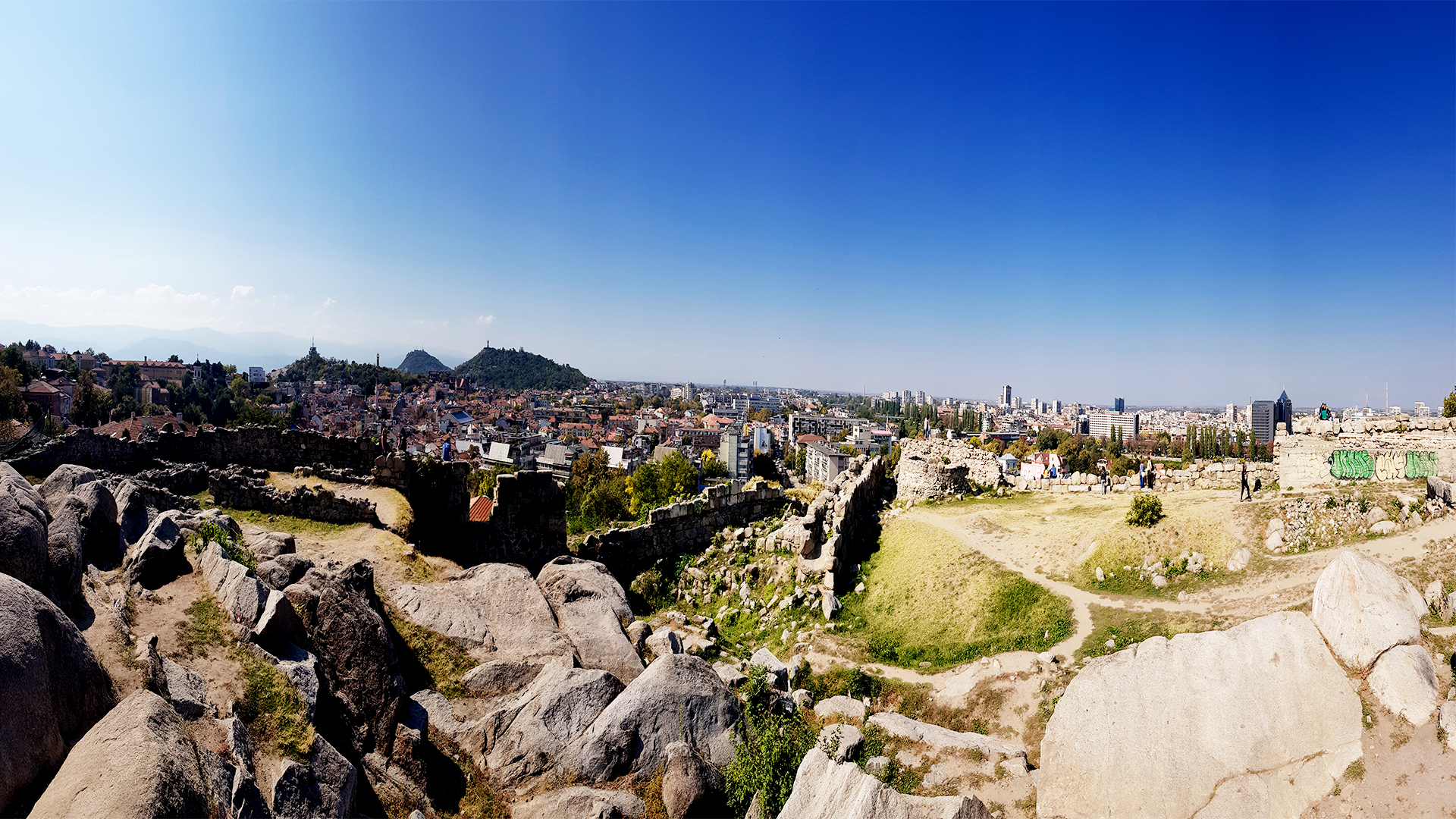 Прочутите седем пловдивски тепета. Половината от тепетата днес вече са само история.